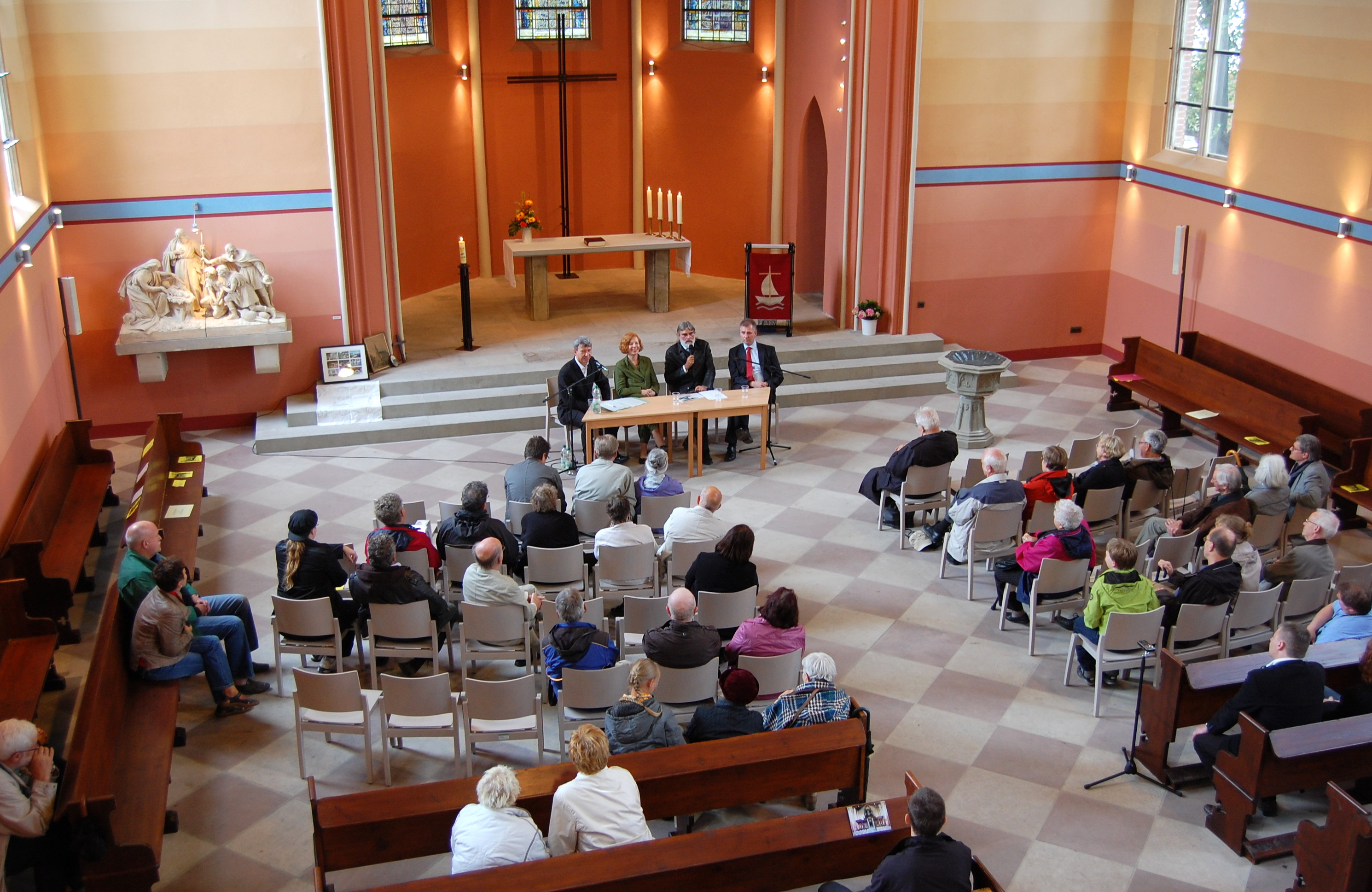 Diskussionsveranstaltung anlässlich der Eröffnung des Lapidariums St. Gertraud